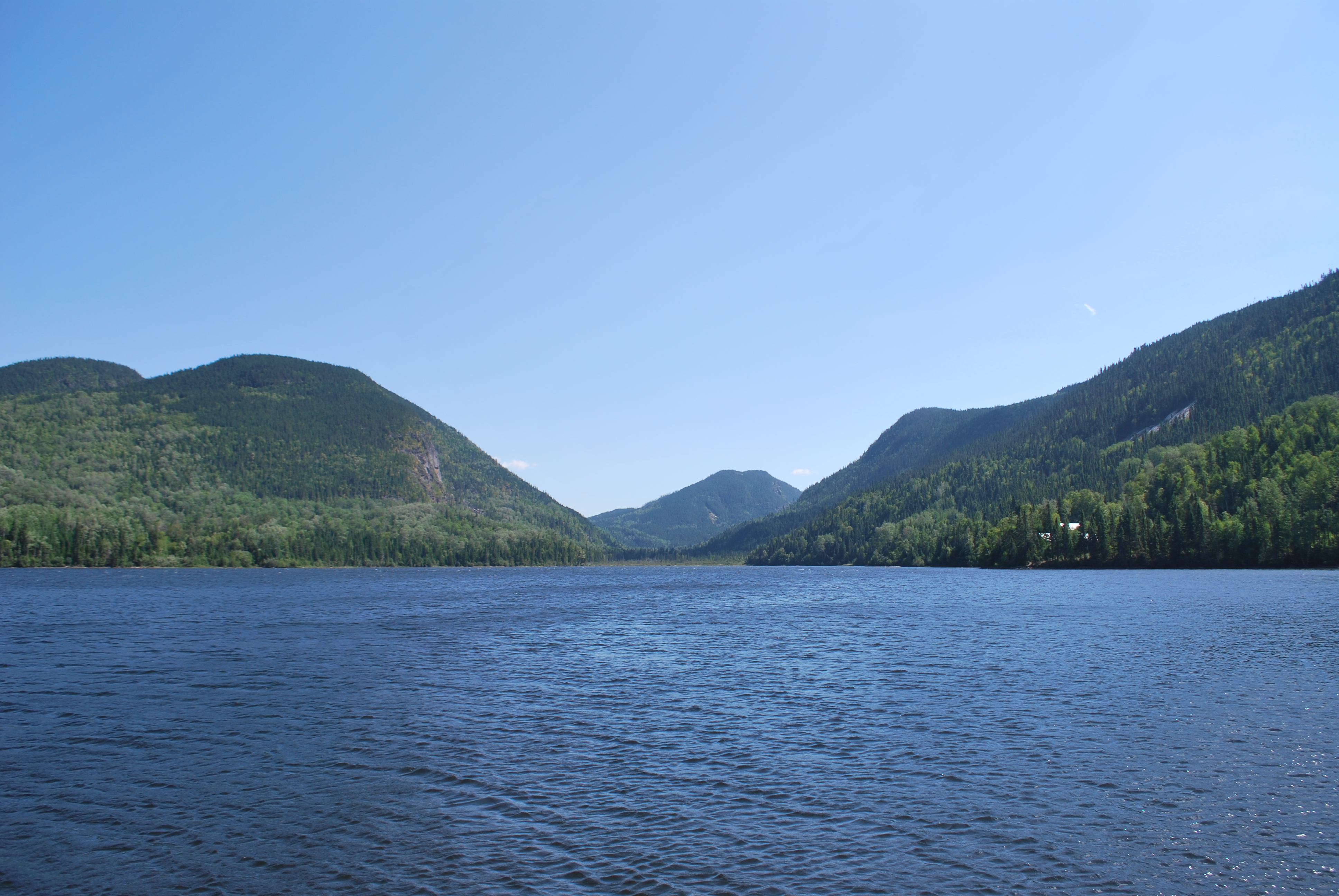 Alentours du Lac Ha! Ha!, à Ferland-et-Boilleau, au Québec.